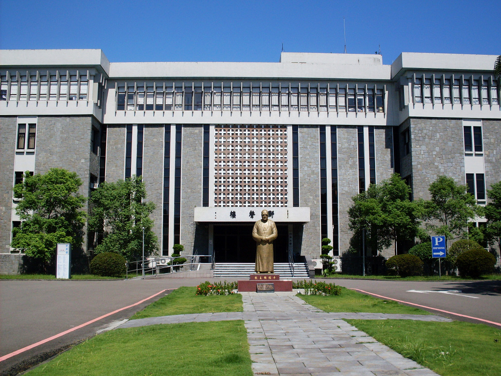 輔大野聲樓